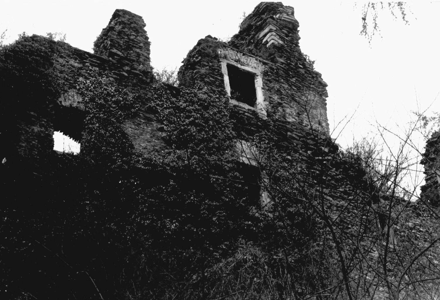 Burg Dalberg